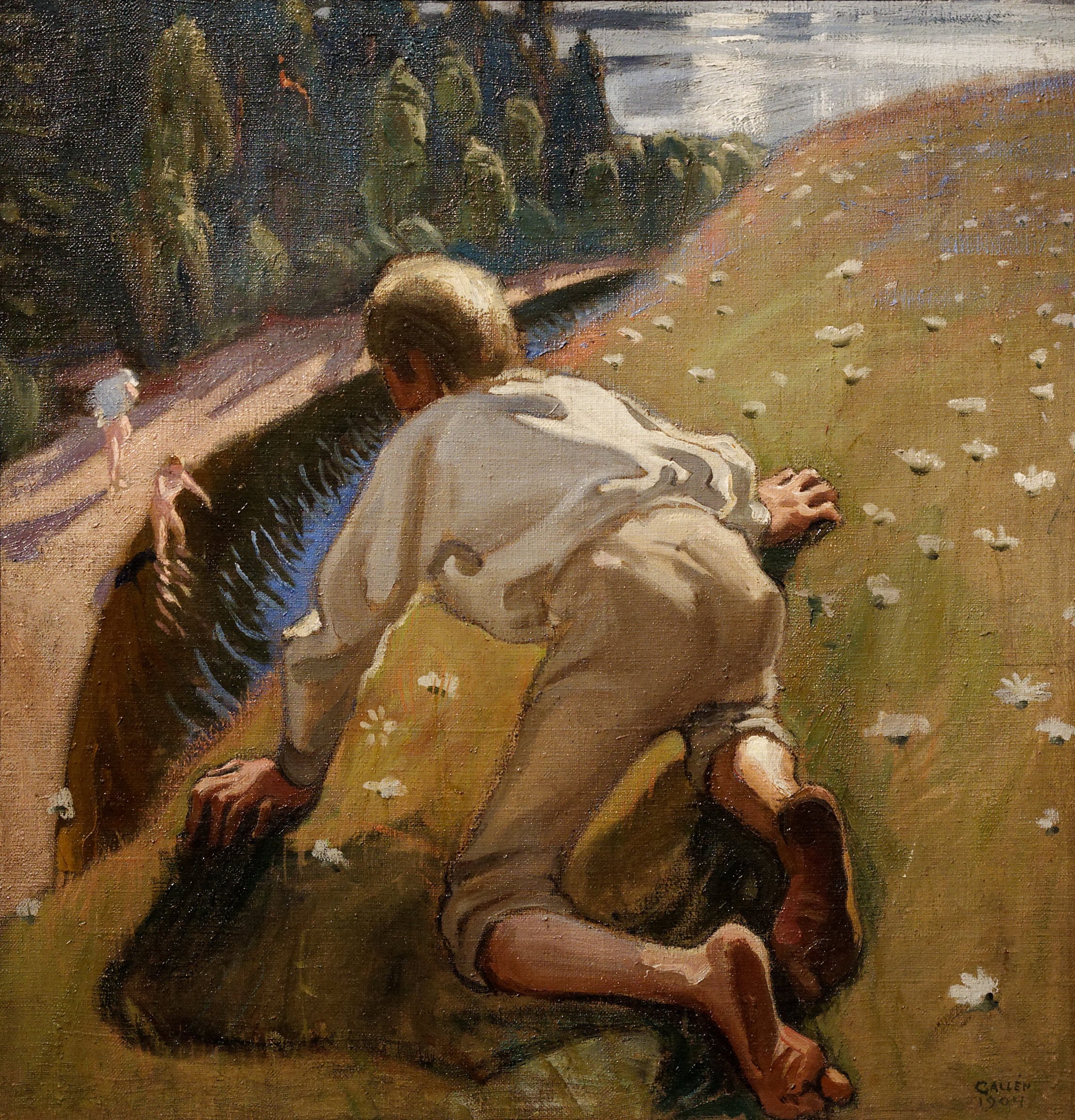 Jeune faune, Akseli Gallen-Kallela (1904). Musée des beaux arts de Budapest Inv.Nr 196 B. Acquis en 1907